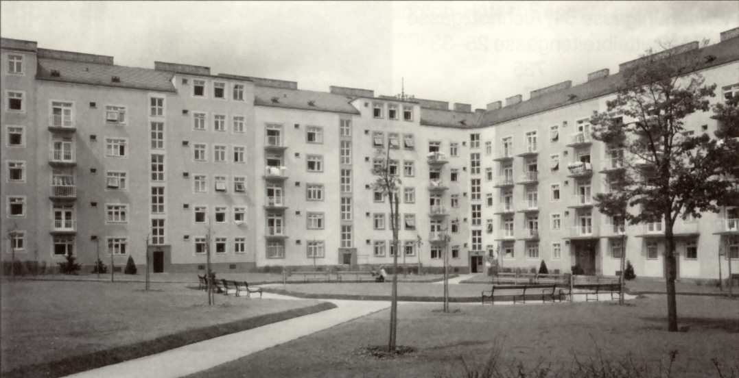 Regenbogenhof in Wien-Meidling, 1930 (heute Leopoldine Glöckel-Hof)